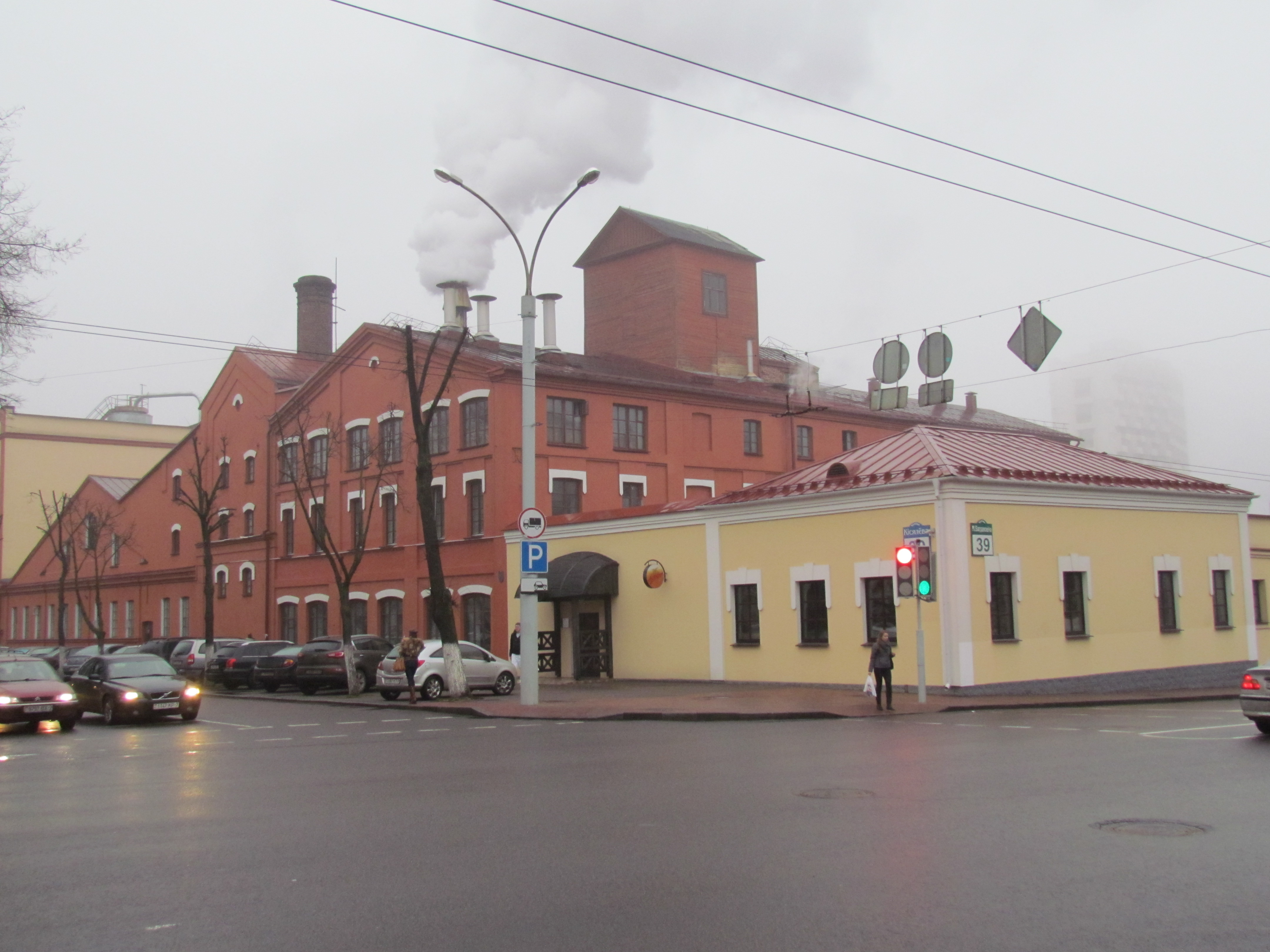 Комплекс будынкаў піваварнага завода «Аліварыя» (1864 год). Скрыжаванне вул. Багдановіча з вул. Кісялёва, г. Мінск This is a photo of Belarusian heritage monument. Reference number: 712Г000083 ( WLM)